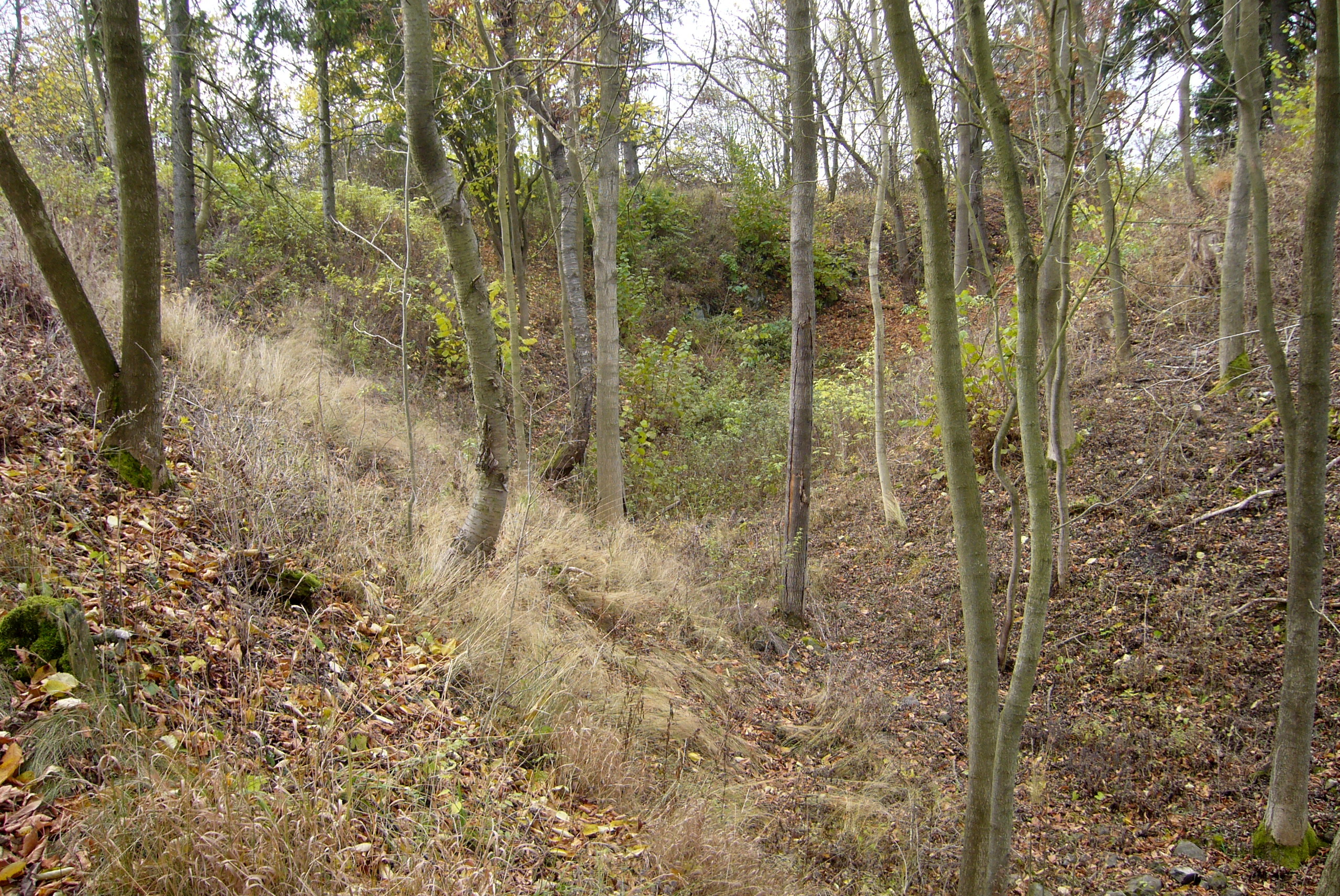 Nevděk - příkop na východní straně hradu